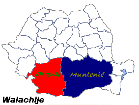 Walachije (Valahia, Ţara Româneasca).